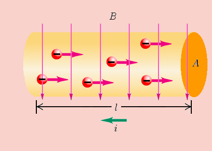 Diagrama de un conductor rectilineo en un campo magnético